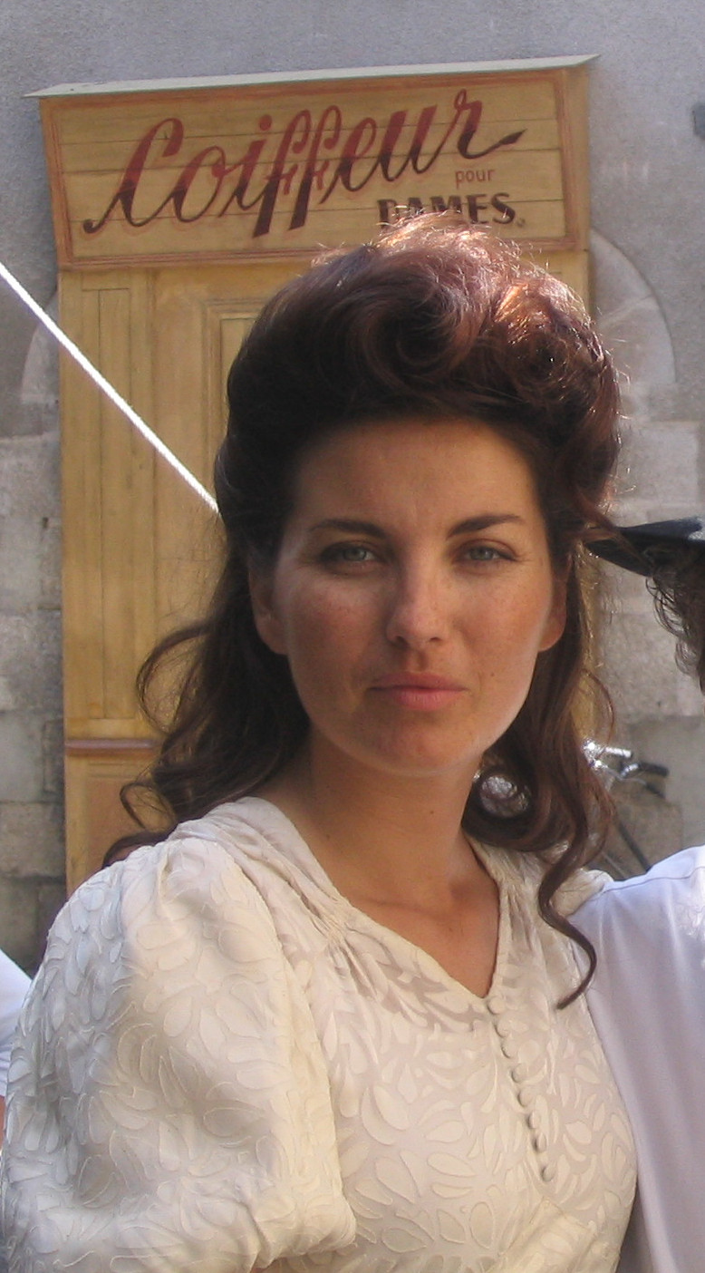 Vanessa Gravina - Tournage : Les camarades (2007)